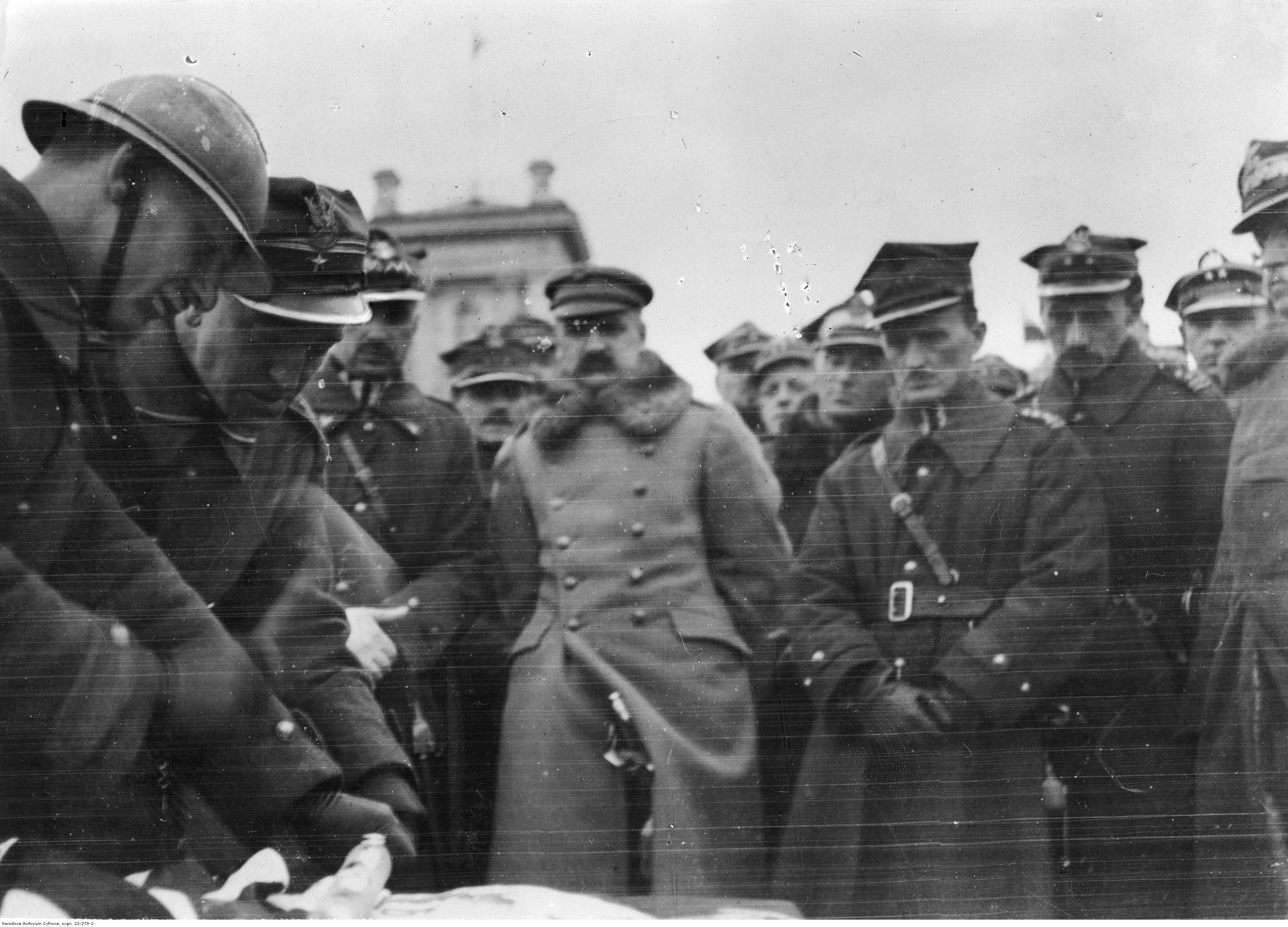 Marszałek Józef Piłsudski w trakcie uroczystości wręczenia sztandarów. Widoczni m.in.: gen. Kazimierz Sosnkowski (1. na lewo od marszałka), gen. Edward Śmigły-Rydz (1. na prawo za marszałkiem) i ppłk Bogusław Miedziński (na prawo od gen. Śmigłego-Rydza).